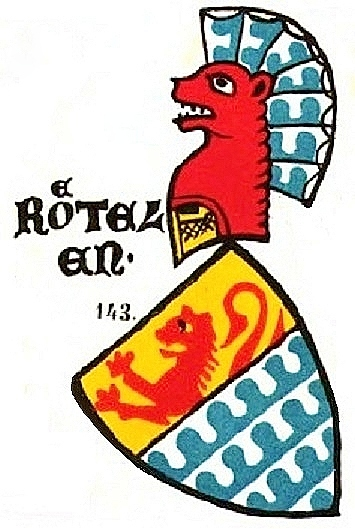 Wappen der Edelfreien von Rötteln